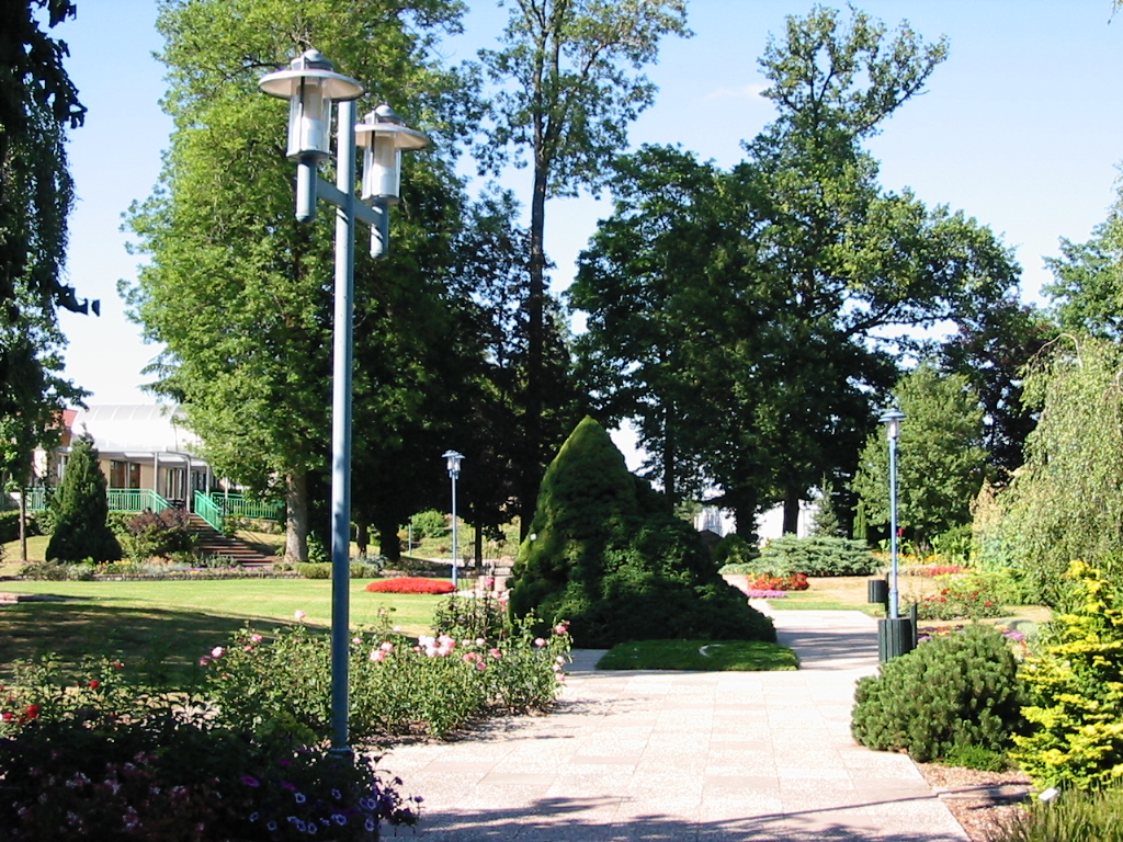 Ecole d'Horticulture et de Paysage de Roville-aux-Chênes Entrée de l'école Commune du canton de Rambervillers (Vosges) Photo personnelle du 10 juillet 2006. Copyright © Christian Amet